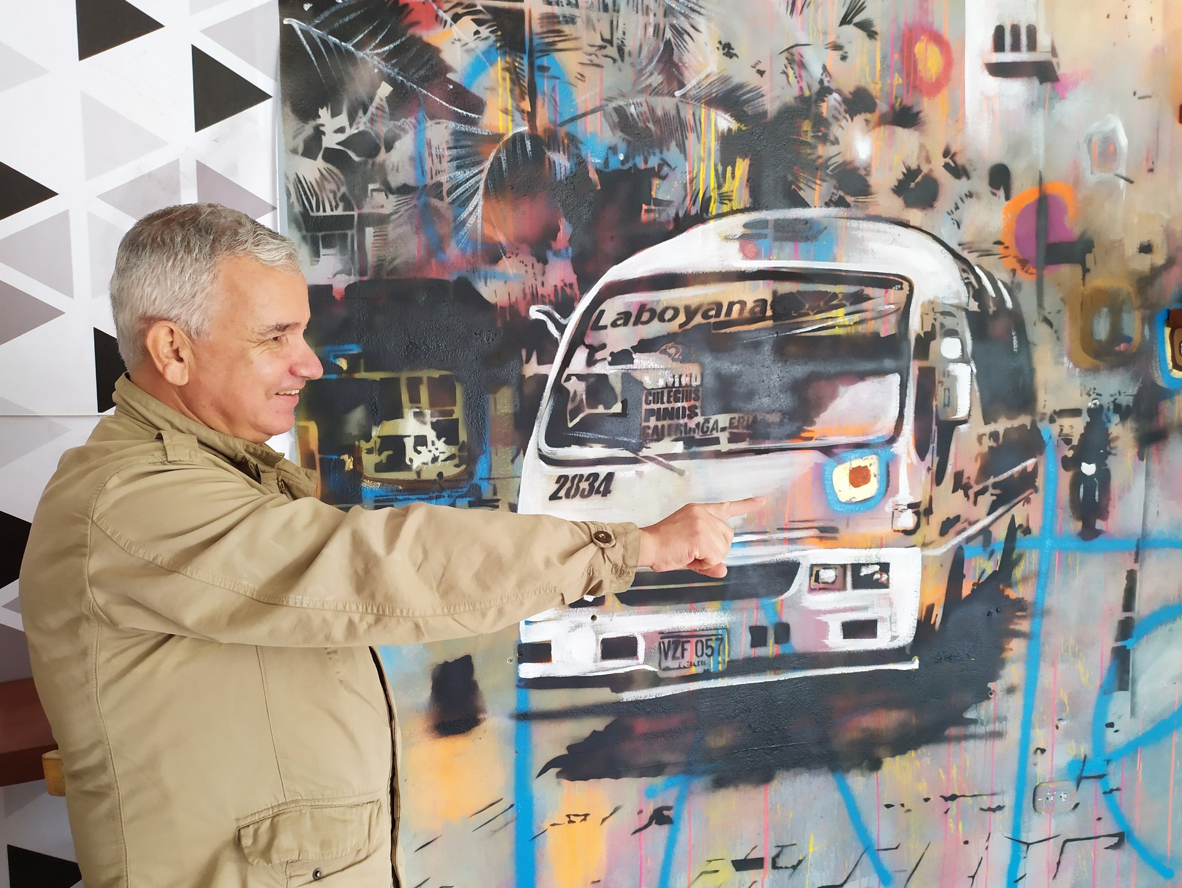 Imagen del artista en mension frente a un mural publico en el centro cultural Hecto Polania de Pitalito Huila